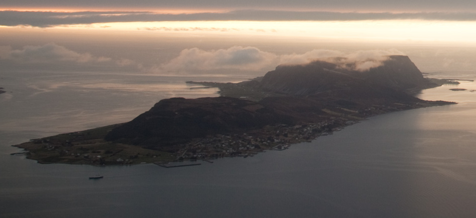 Haramsøya